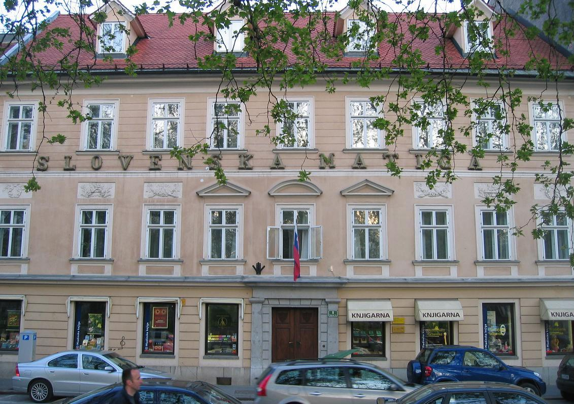 Slovenska matica bldg.(Slovene literary society), Ljubljana. 1830.[1] photo:Ziga 19:48, 8 May 2006 (UTC)